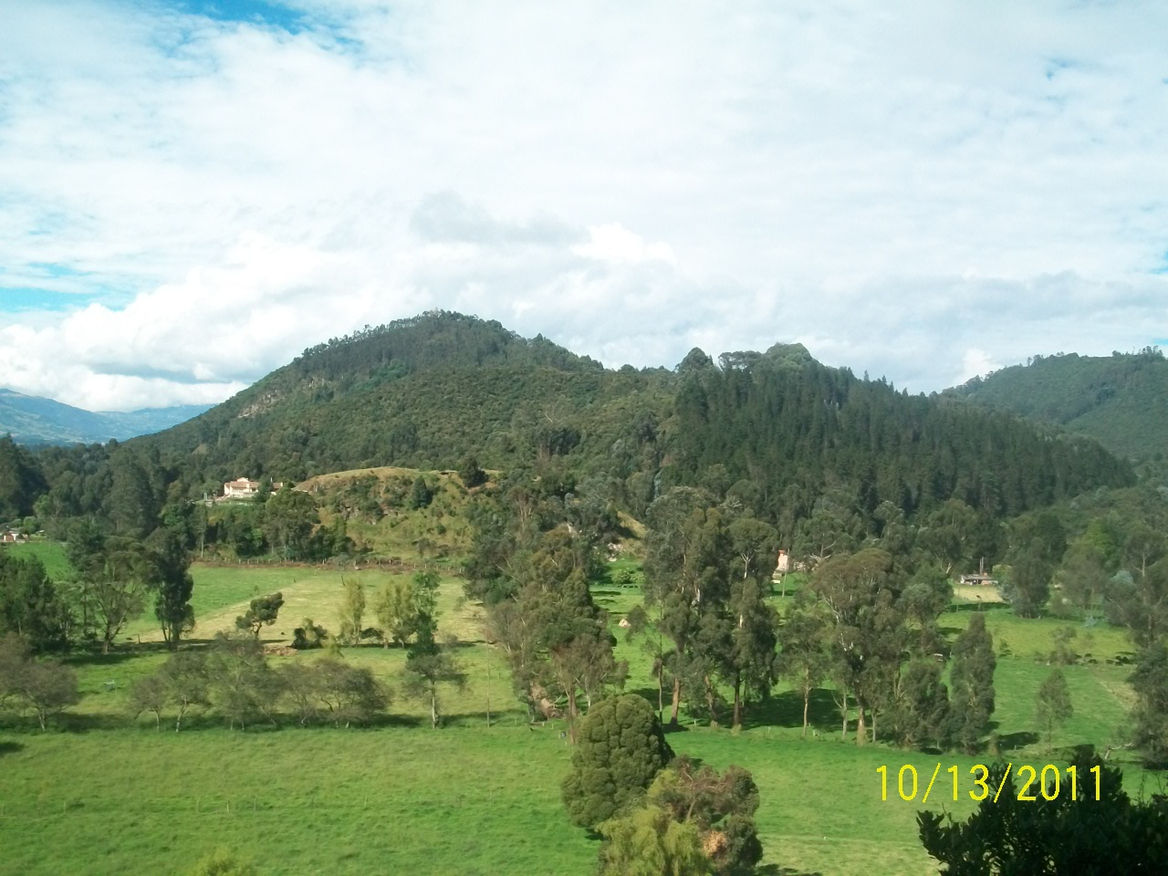 CERRO CATATUMBO